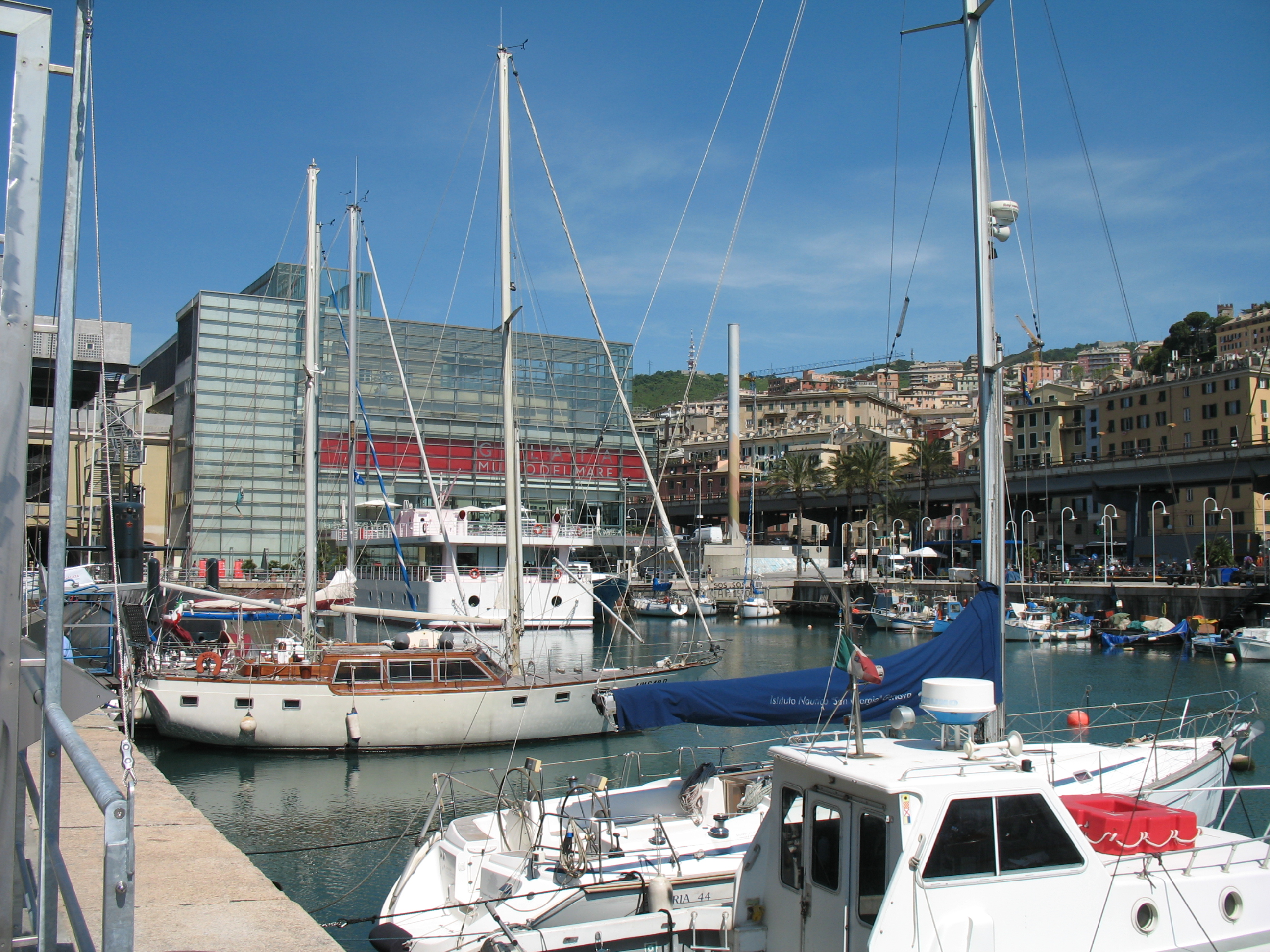 L'area della Darsena del porto antico di Genova con l'edificio del Galata - Museo del mare